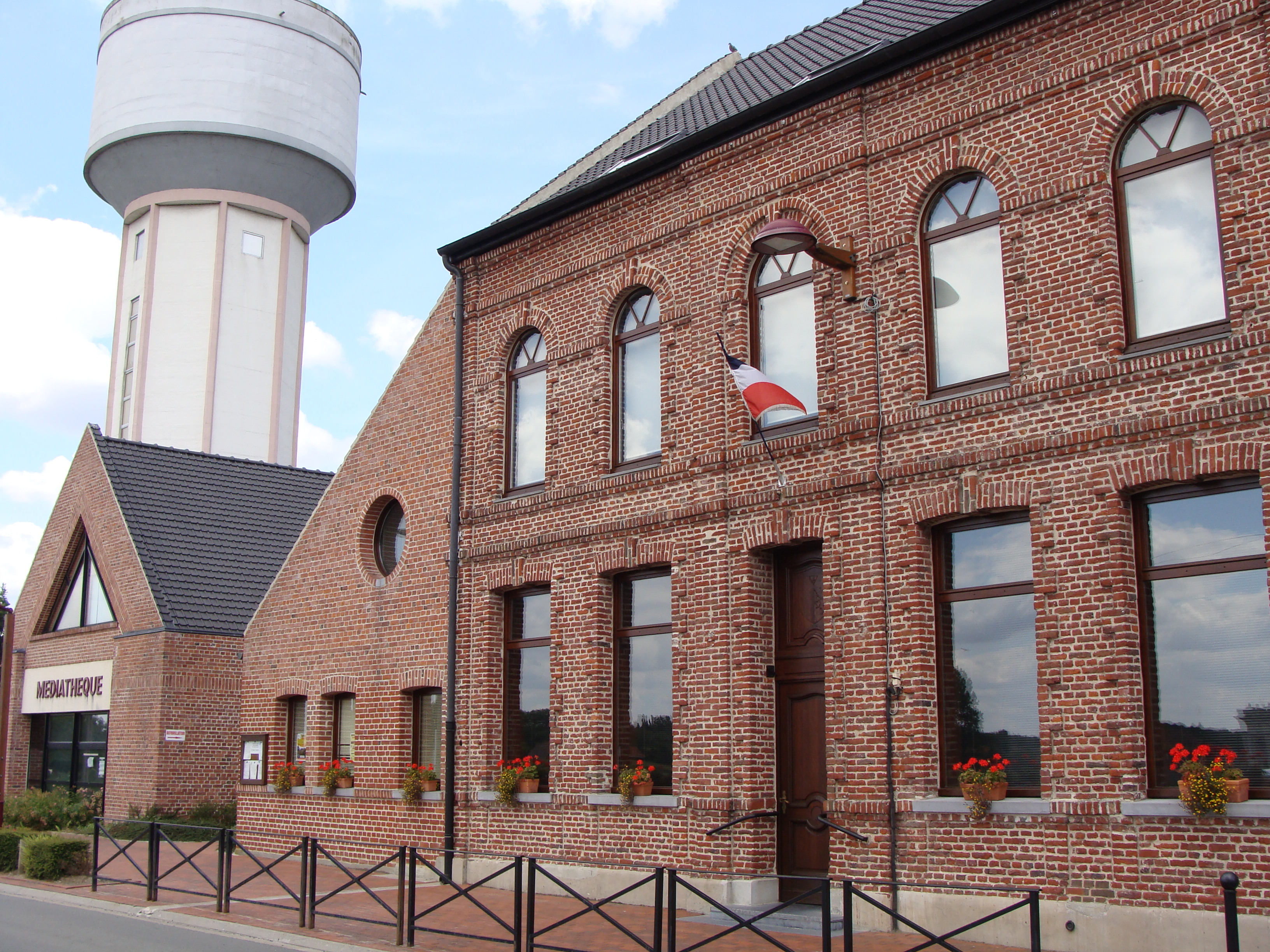 Mairie de Bouvignies département du Nord de la France